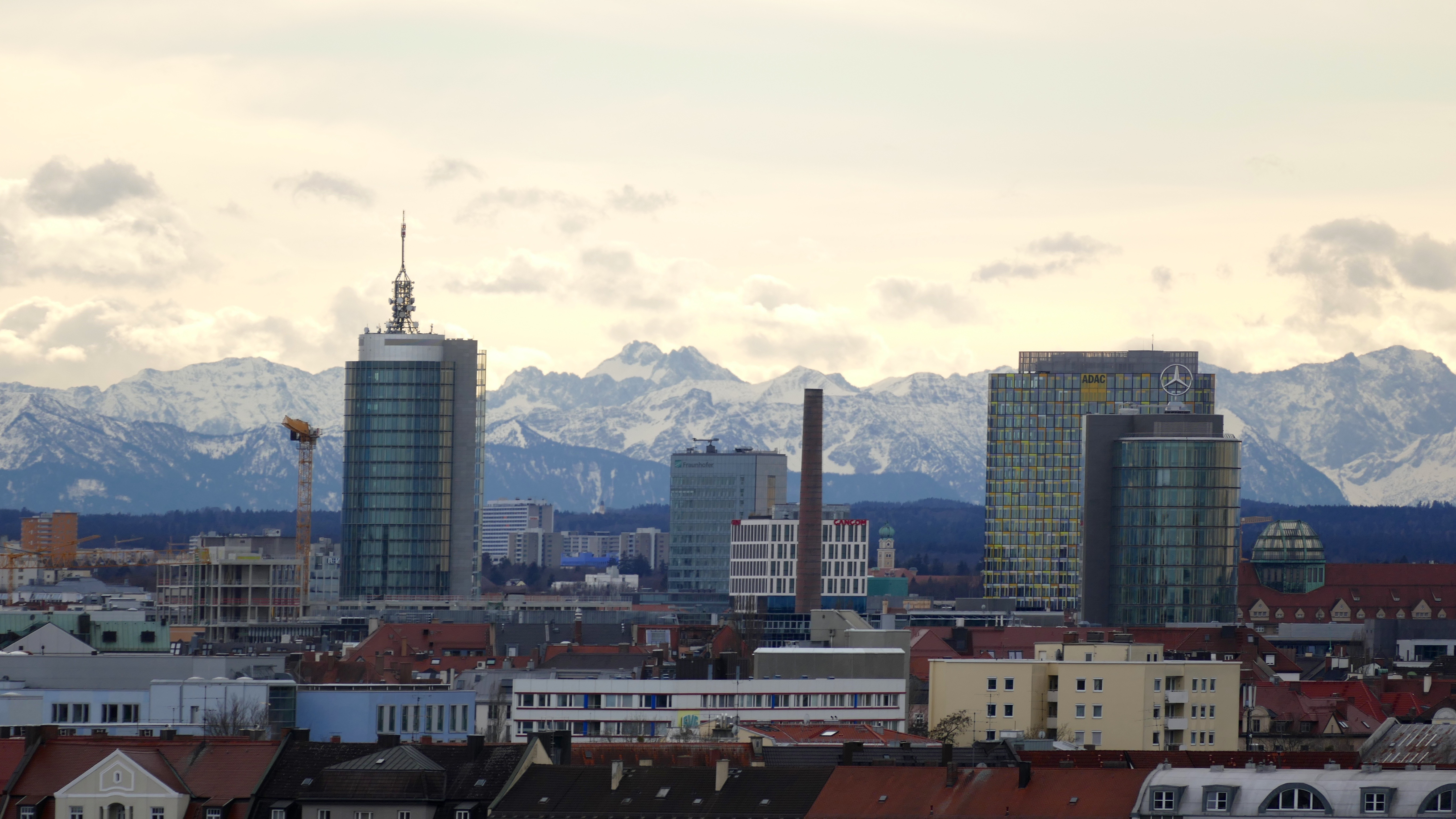 Blick vom Olympiaberg mit Central Tower Munich und Allianz-Zentrum bei Föhn - mit Bergsicht